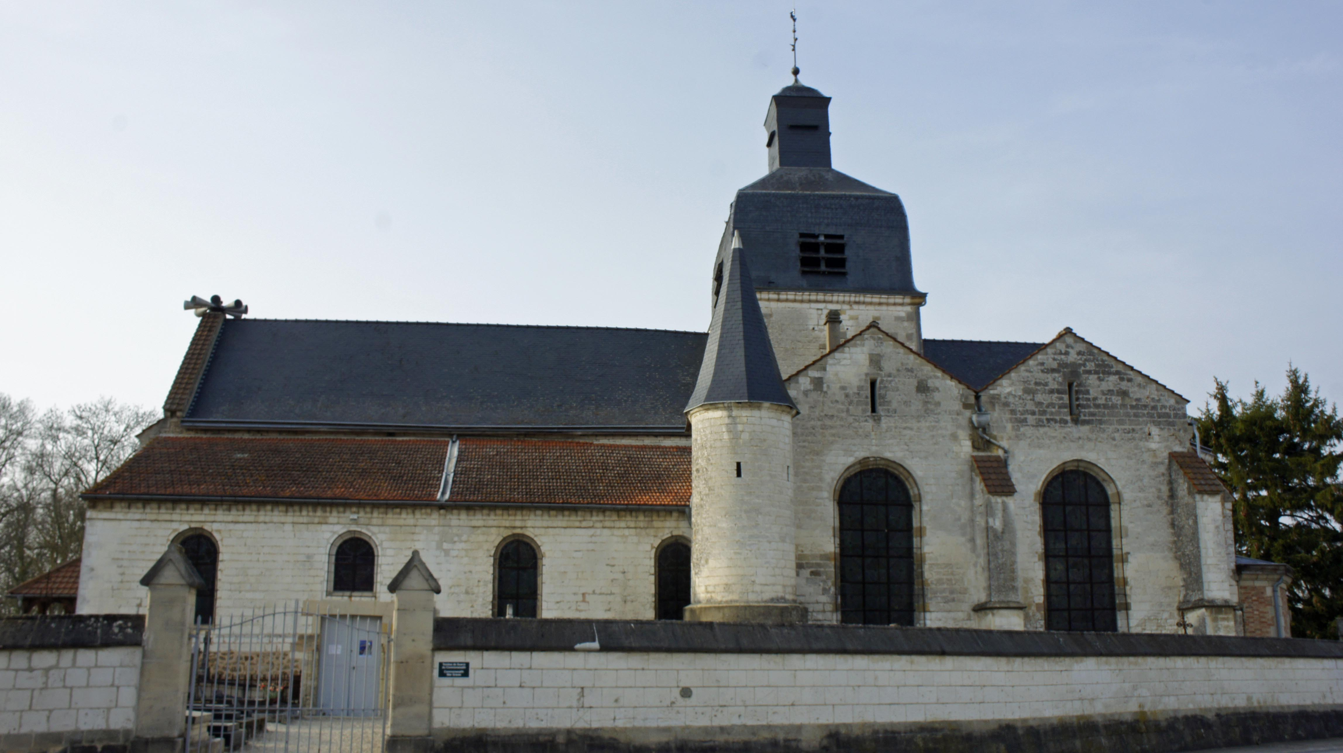 Église de saint-Germain-la-Ville.